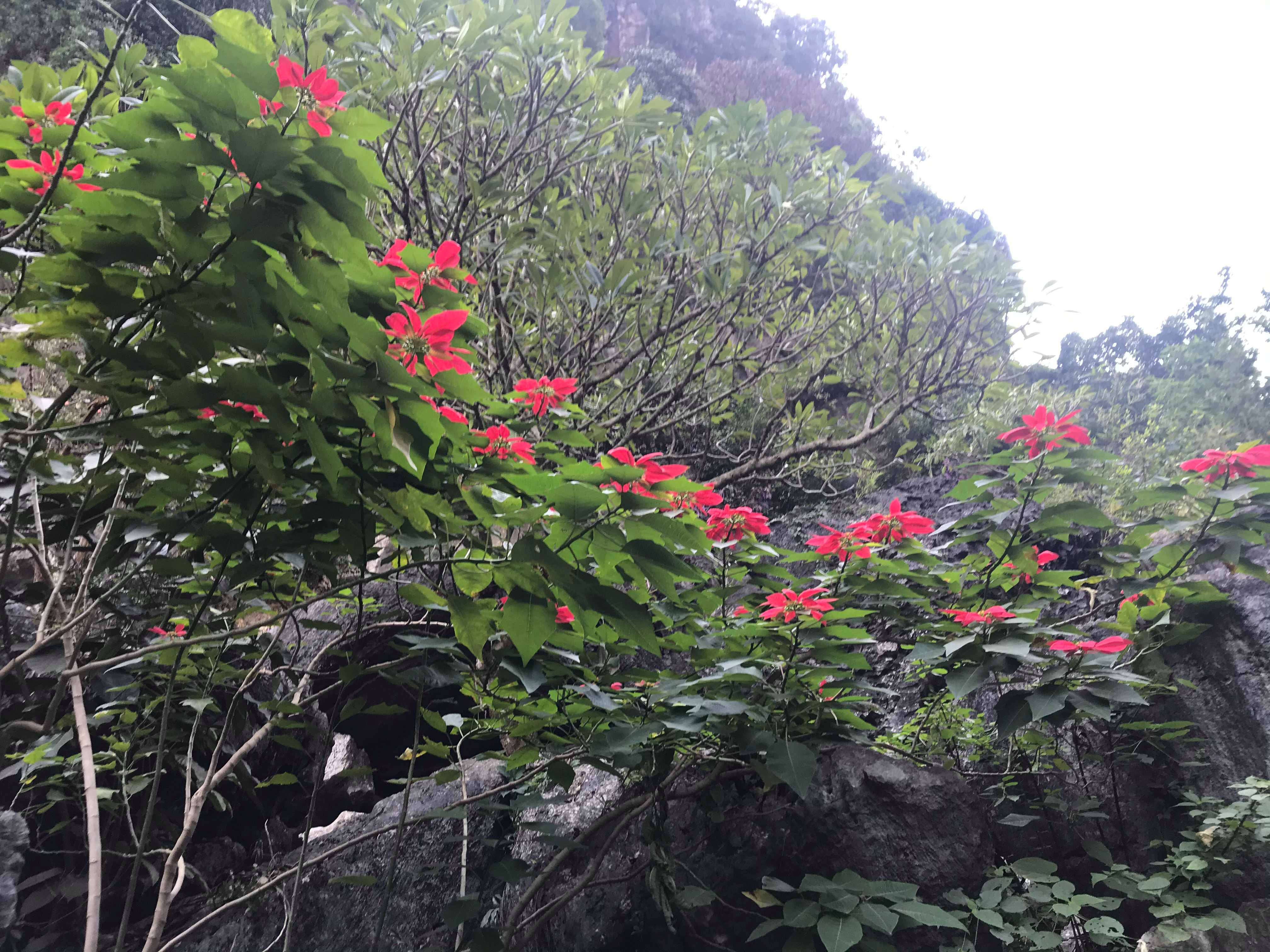 Hoa trạng nguyên bên phải chùa Hạ nở rộ vào một tháng 12 năm 2019.